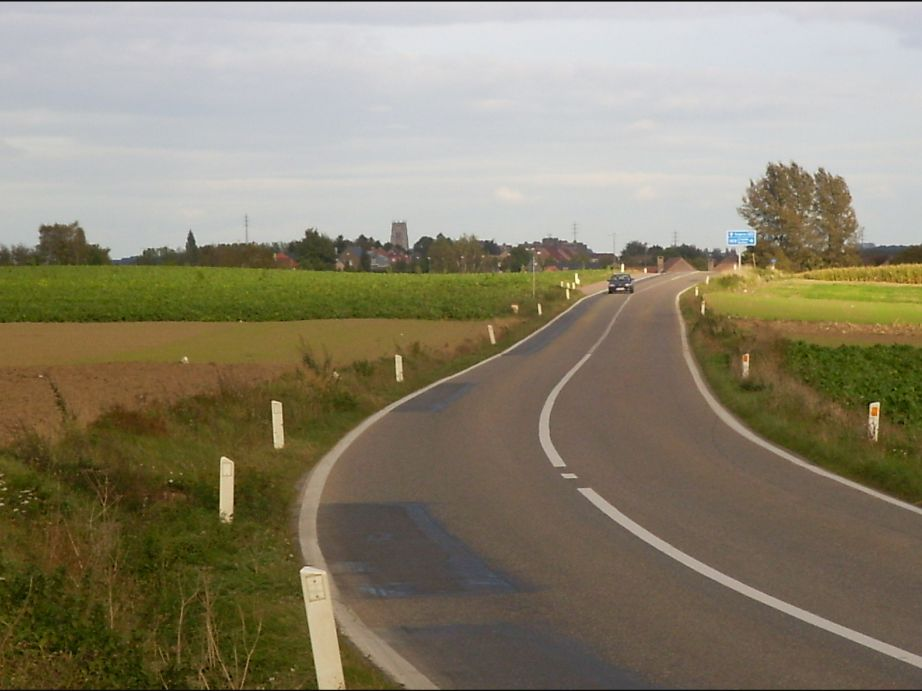 heerweg met Tongeren in de achtergrond - eigen foto